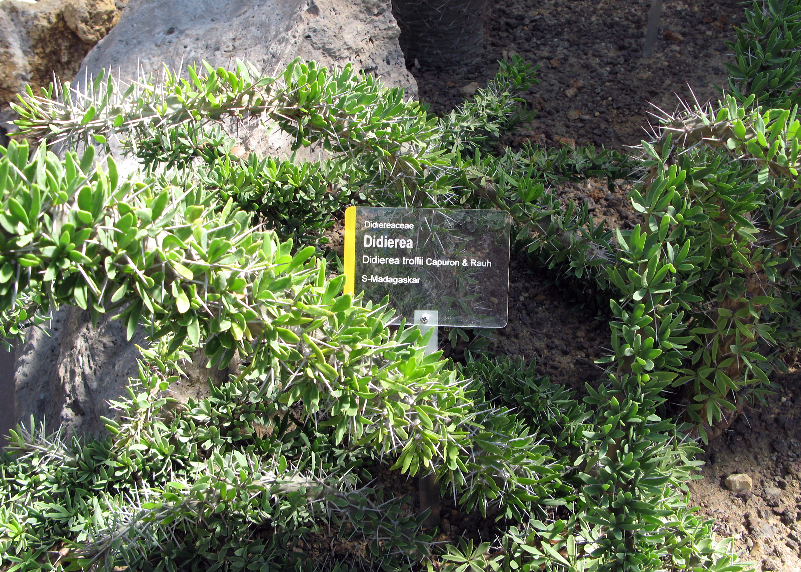 Didiereaceae - Didierea trollii aus Süd-Madagaskar, aufgenommen im Stuttgarter Zoo Wilhelma